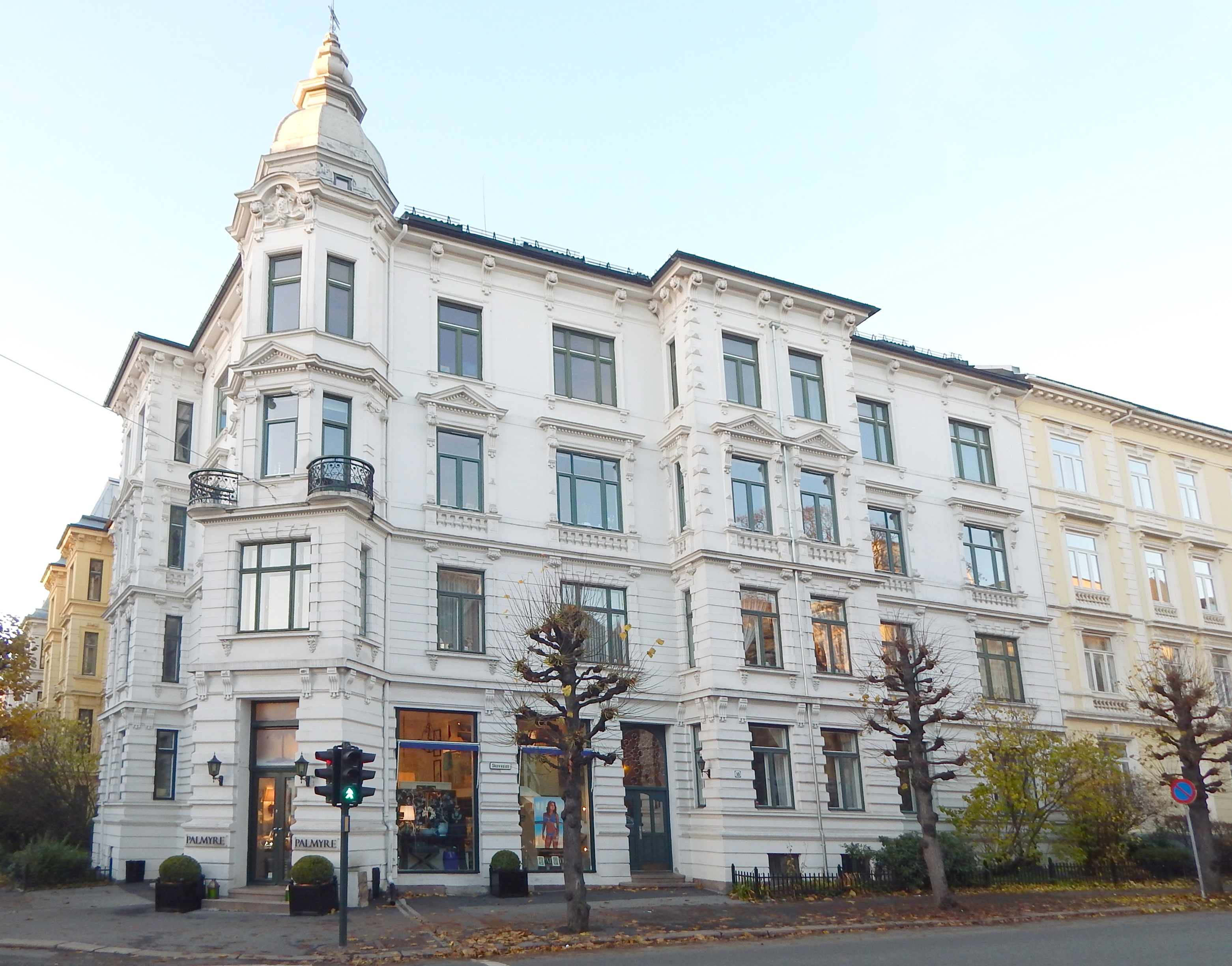 Skovveien 16